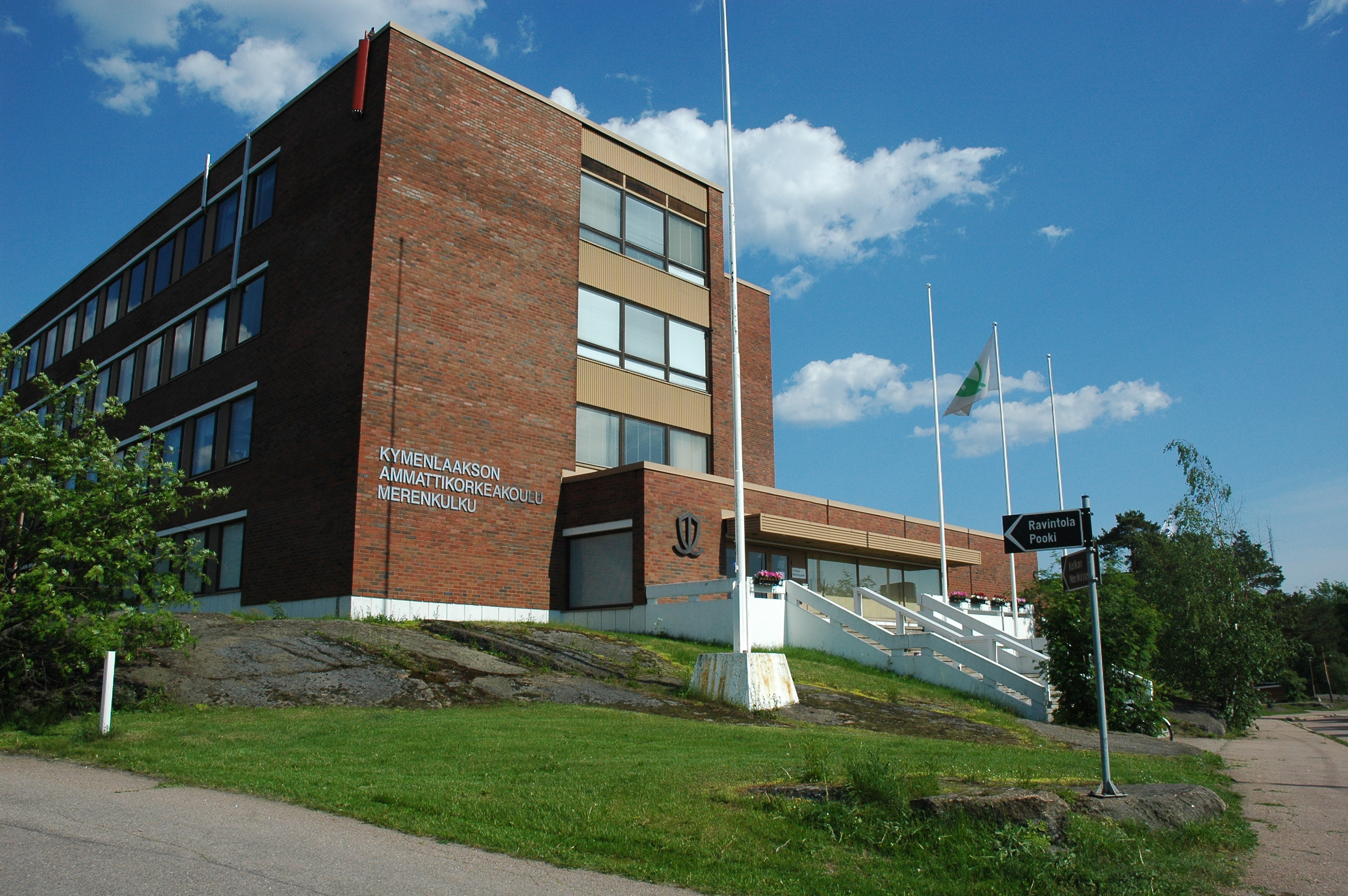 Kymenlaakson ammattikorkeakoulu merenkulku (Marine school of the Kymenlaakson Polytechnic)